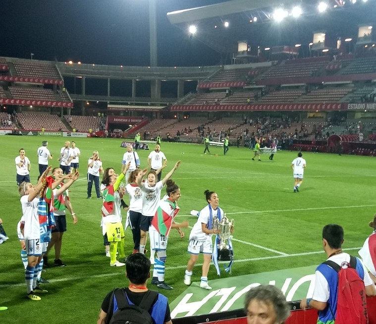 Chini Pizarro celebrando la Copa de la Reina 11-05-2019